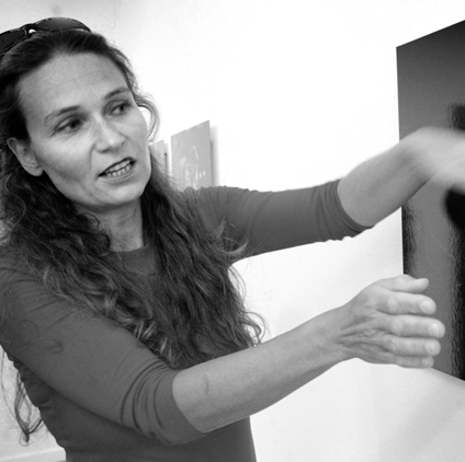 Die Künstlerin Anja Jensen lebt und arbeitet in Hamburg und Münster.